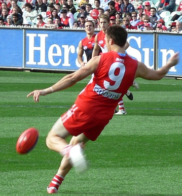 kick